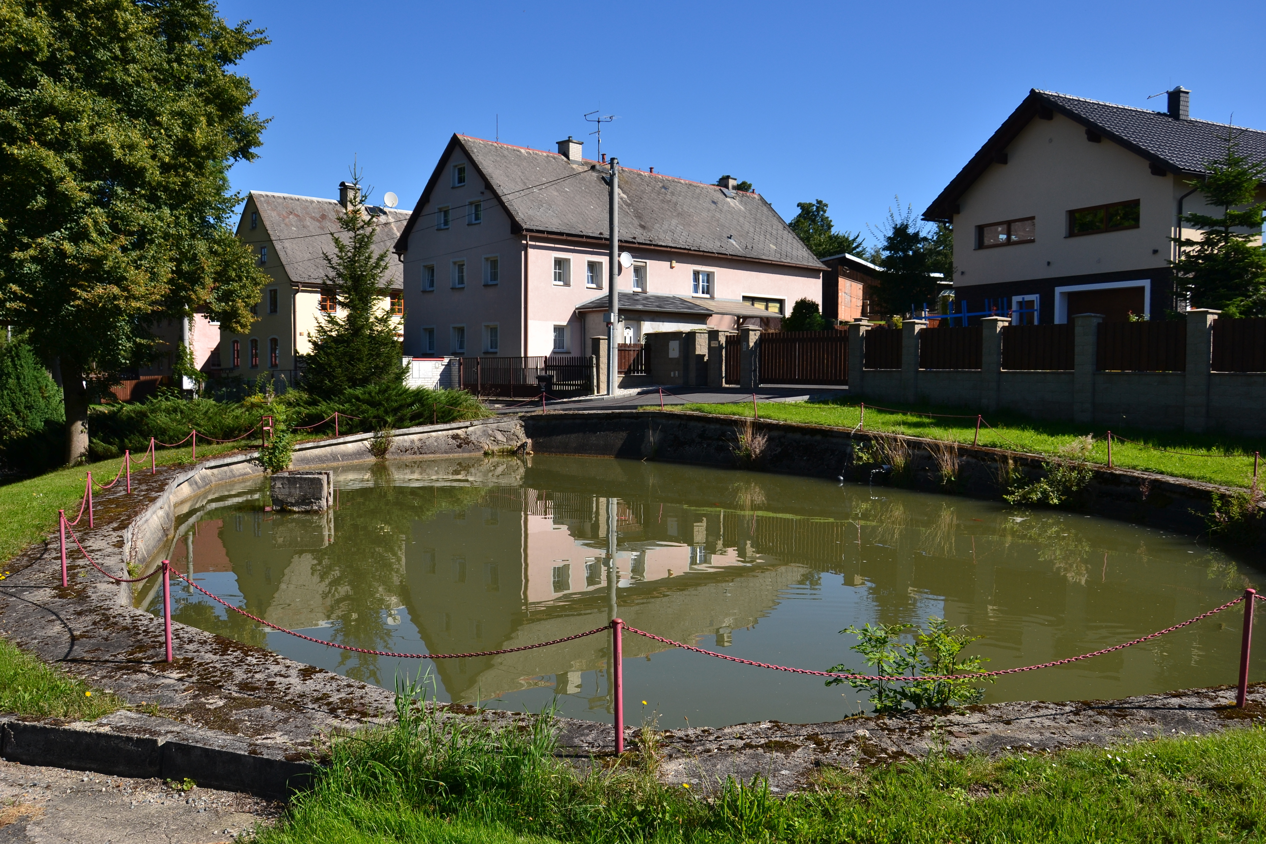 Návesní rybník